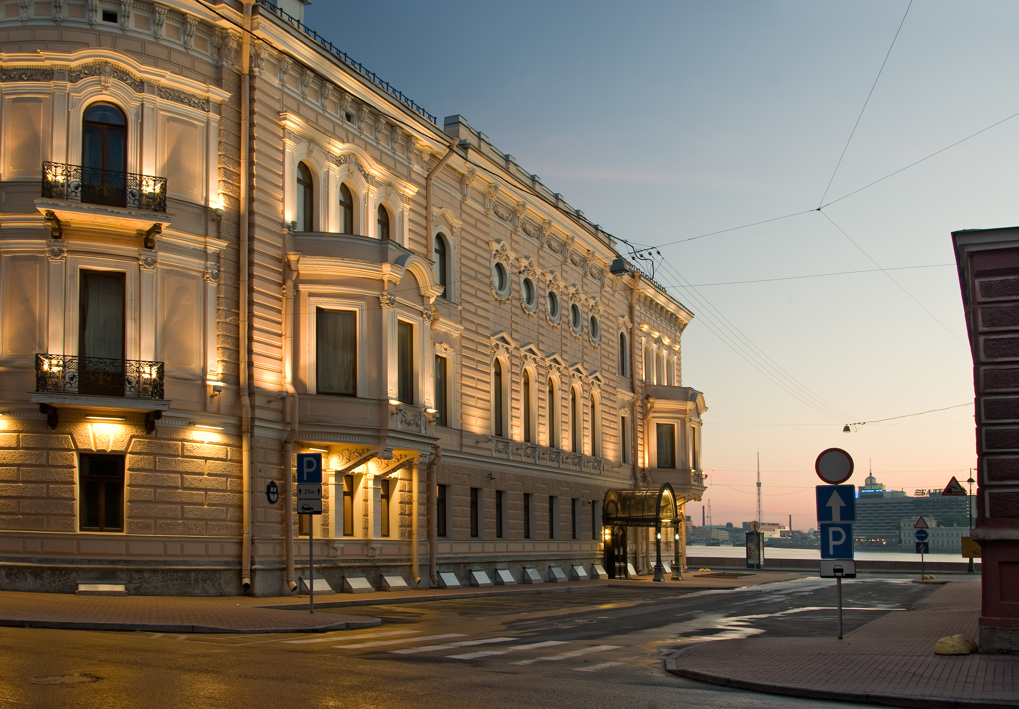 Кричевский переулок (Санкт-Петербург). В кадре дом №2.